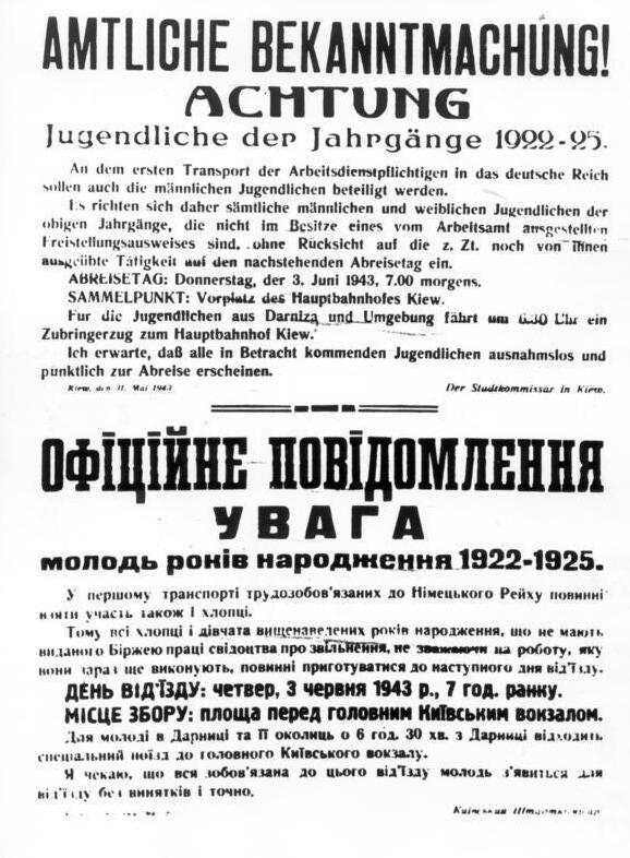 Ausländische Arbeitskräfte, Bekanntmachung Kiew Zentralbild-Archiv II. Weltkrieg 1939 - 1945 In den von den deutschen Faschisten besetzten Gebieten der Sowjetunion wir die Zivilbevölkerung für die Rüstungsarbeit in Deutschland zwangsverpflichtet. UBz: Eine Bekanntmachung des Stadtkommissars von Kiew vom 31. Mai 1943 [Amtliche Bekanntmachung! Achtung Jugendliche der Jahrgänge 1922-25]